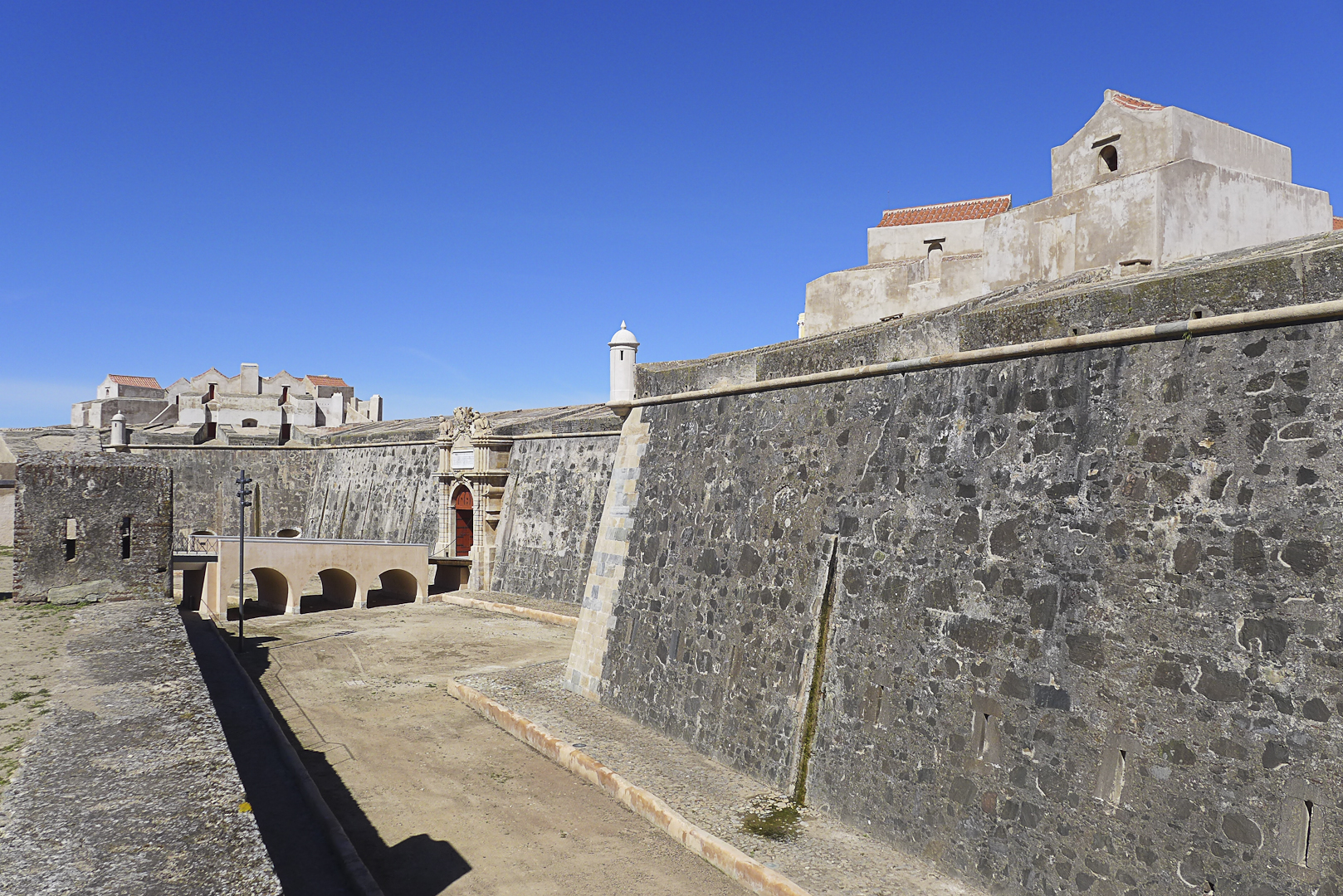 Portugal-Elvas-Forte de Nossa Senhora da GraçaP1170654